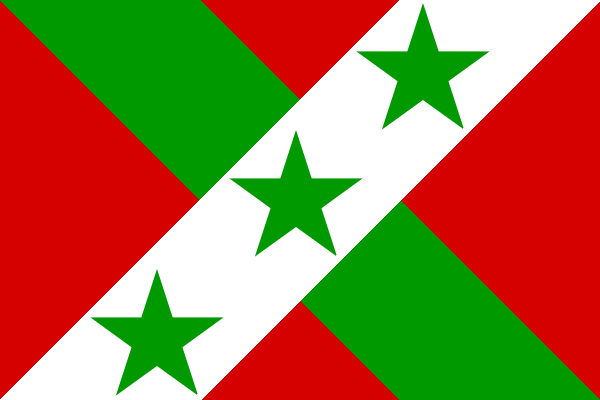 Flago de la Kastela Respubliko